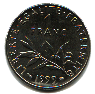 Piece 1 Franc 1999 face 1